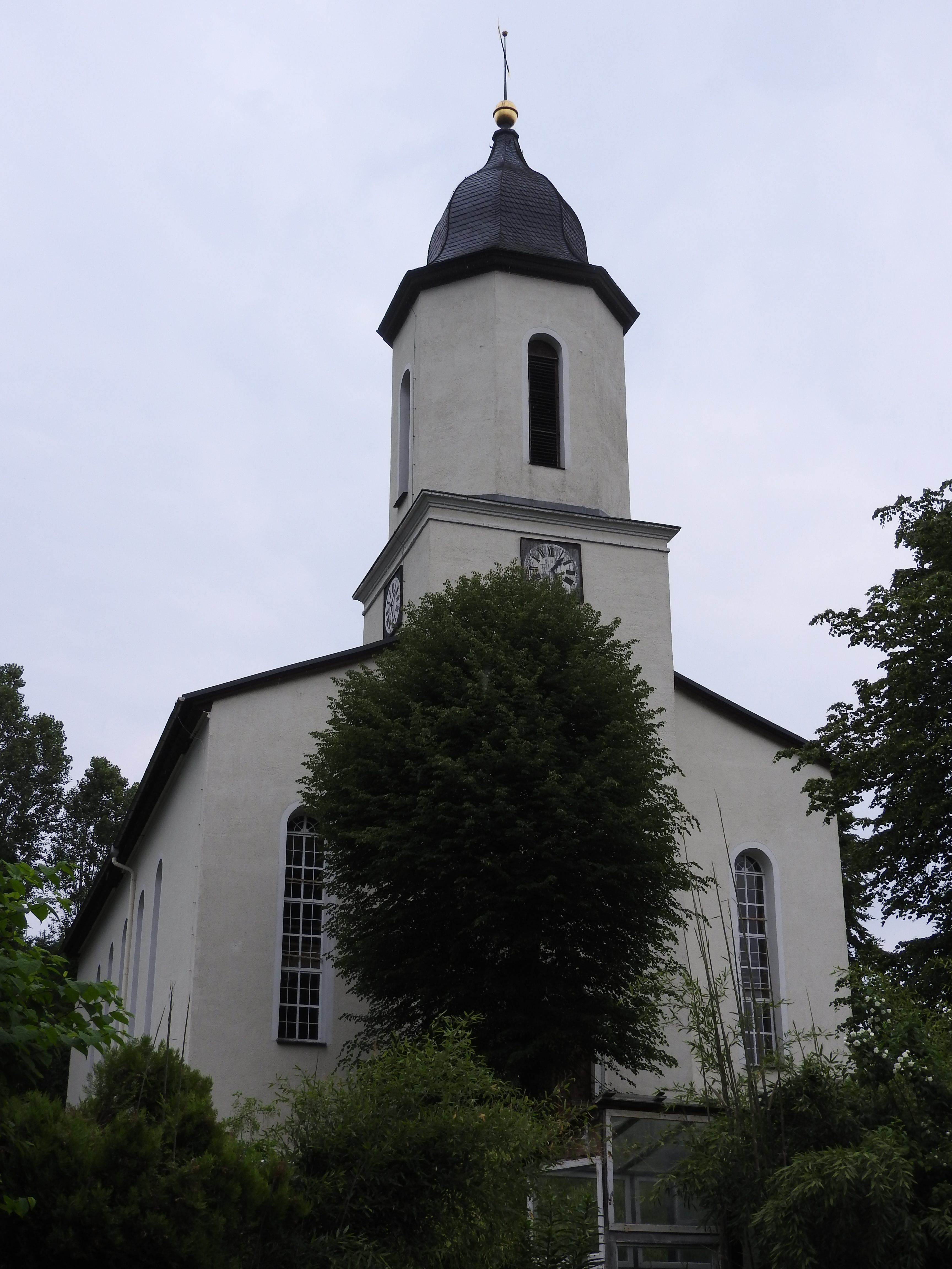 Kirche von Ruppersdorf, Remptendorf in Thüringen